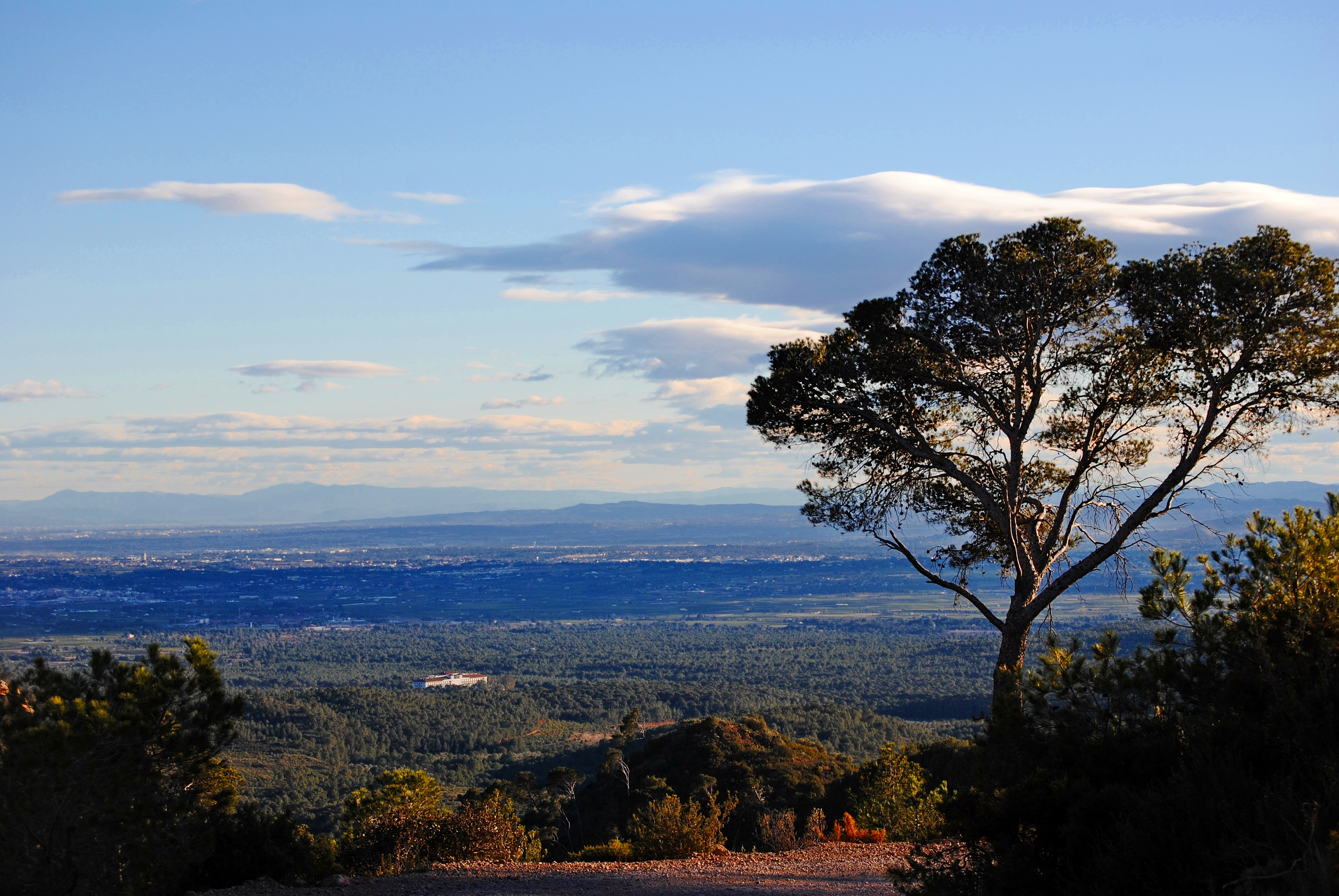 Este paraje de 17.772 hectáreas fue declarado parque natural por el gobierno valenciano el 15 de enero de 2002. El parque natural forma parte de una sierra en las estribaciones del Sistema Ibérico de una extensión aproximada de 60.000 hectáreas que separa las cuencas de los ríos Palancia al norte y Turia al sur. Por su cercanía a la ciudad de Valencia, unos 20 km, es considerada como el principal pulmón verde de esta. This is a photography of a Special Area of Conservation in Spain with the ID: ES5232002. Natura2000 entry, EEA entry